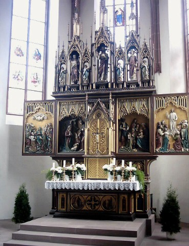 Der neugotische Hochaltar der Pfarrkirche St. Laurentius in Ebern/Ufr. Eigene Aufnahme, 2005